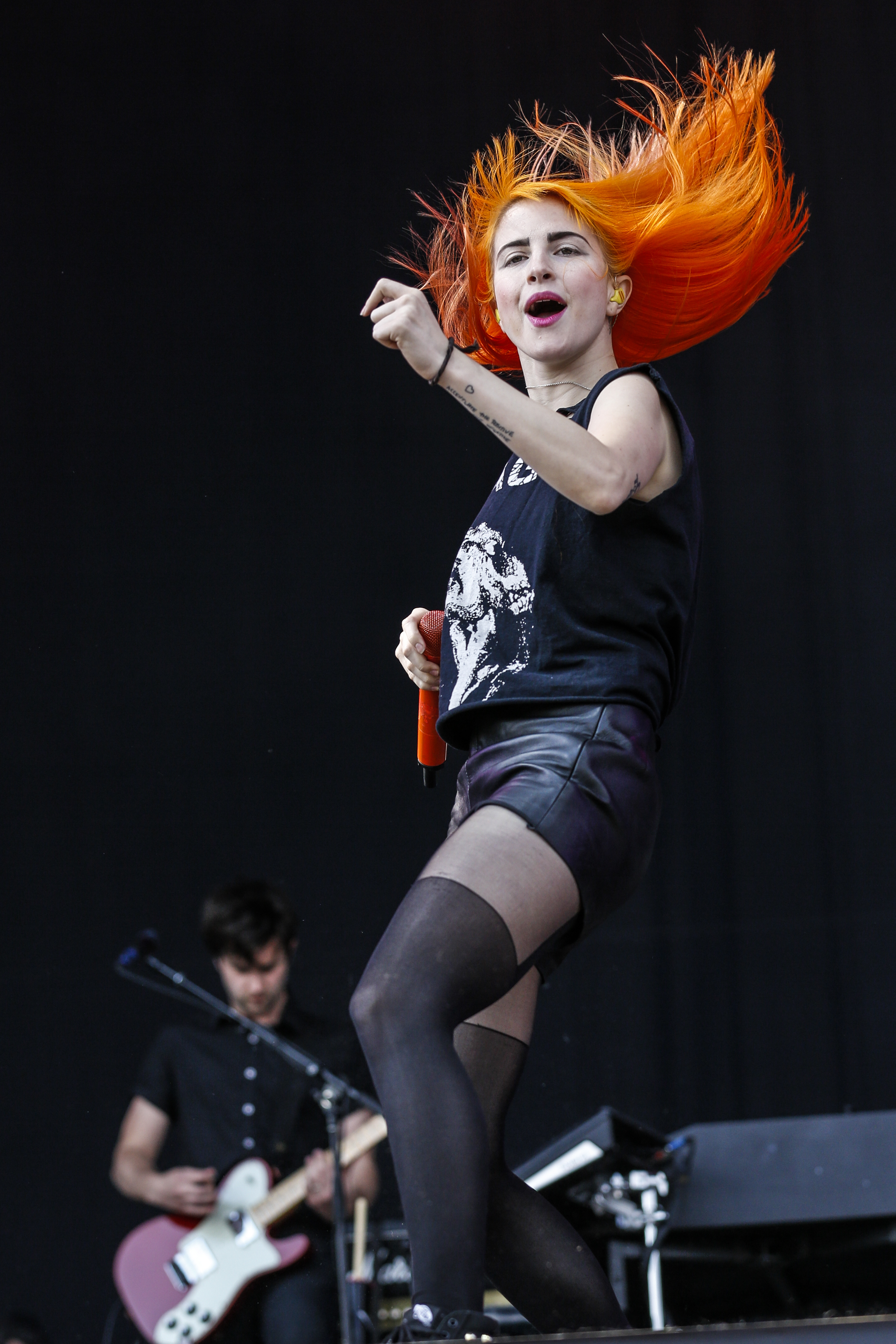 Die Sängerin der Band "Paramore" Hayley Williams bei Rock im Park 2013 in Nürnberg.